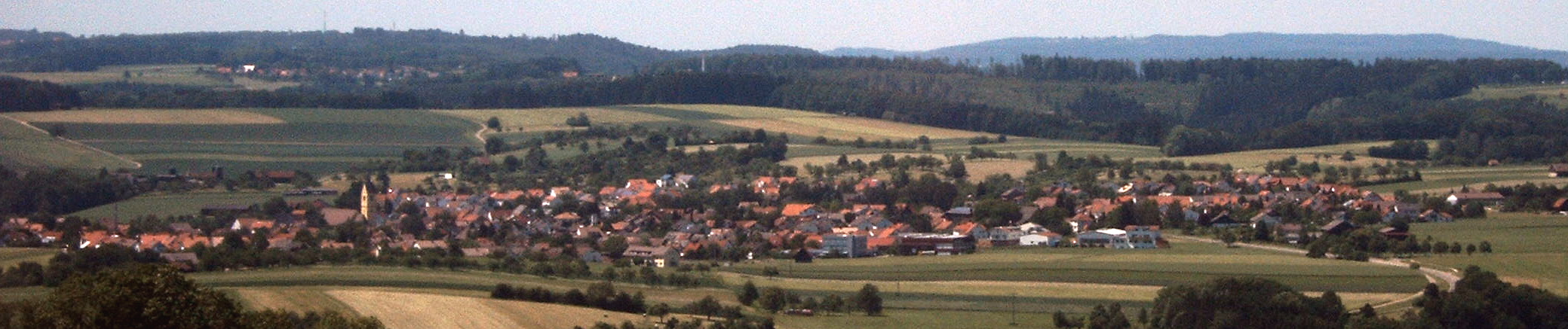 Der Ort Wäschenbeuren, gesehen vom Aasrücken